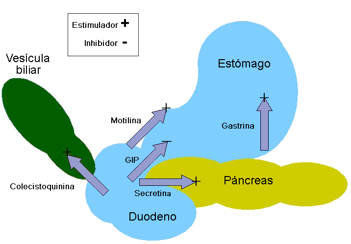 Acción de las principales hormonas digestivas.